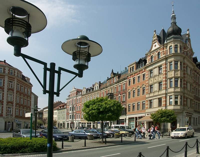 Wettiner Platz mit Denkmalschutzgebiet der Gründerzeit